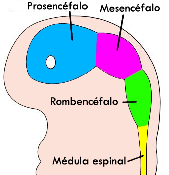 Cerebro de un embrión humano de cuatro semanas